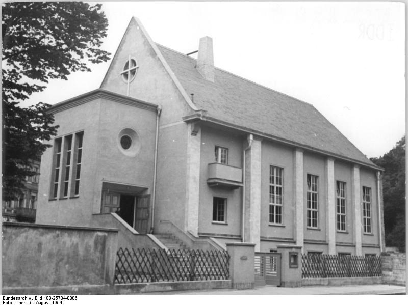 Leipzig, Kirche Zentralbild Illner Wjk-Qu 27 Mot. 5.8.1954 Leipziger Motive und Stadtbilder UBz: Leipzig: Das Gotteshaus der evangelisch-freikirchlichen Gemeinde. Erbaut 1954